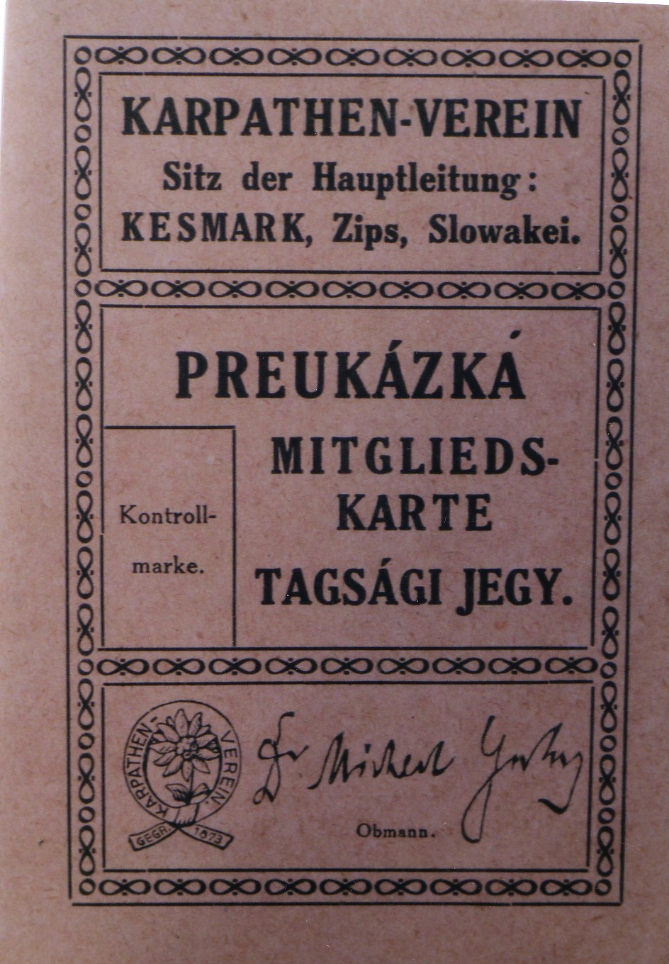 Karpathenverein dreisprachig